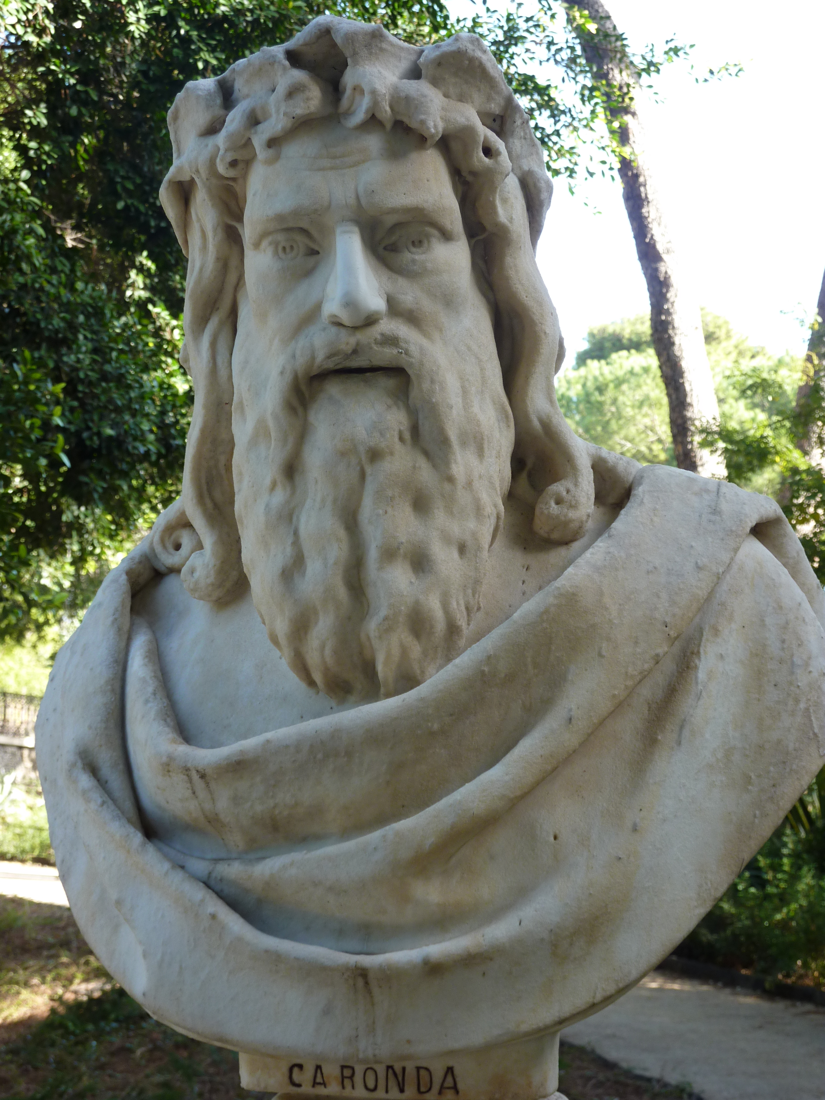 Statua di Caronda